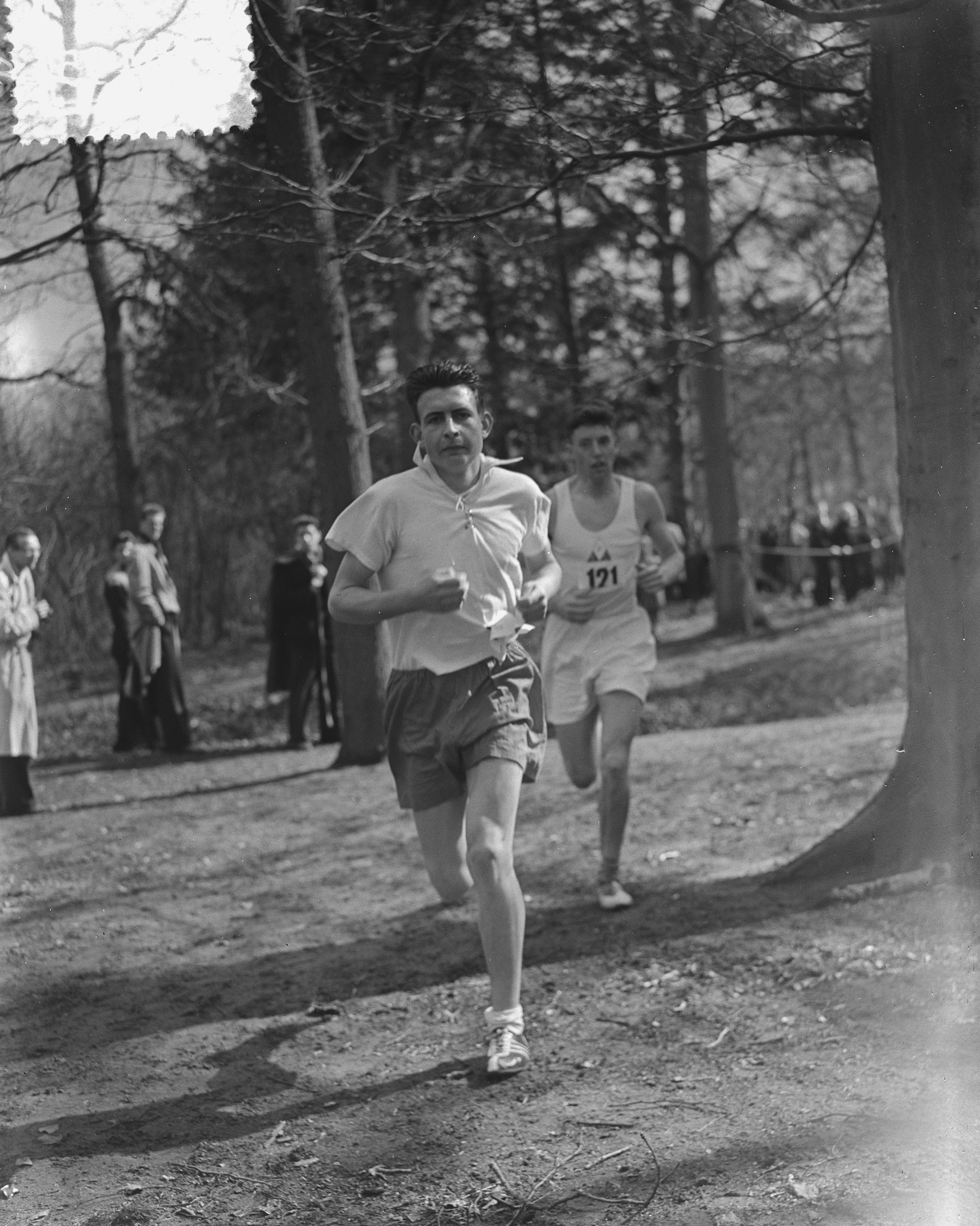 Collectie / Archief : Fotocollectie Anefo Reportage / Serie : [ onbekend ] Beschrijving : Veldloopkampioenschappen in Wassenaar. Junioren A. voorop Joep Delnoye , R. Spierenburg (P.E.C.) Datum : 6 april 1953 Locatie : Wassenaar, Zuid-Holland Trefwoorden : atletiek, sport Persoonsnaam : Delnoye Joep, Spierenburg R Fotograaf : Bilsen, Joop van / Anefo Auteursrechthebbende : Nationaal Archief Materiaalsoort : Glasnegatief Nummer archiefinventaris : bekijk toegang 2.24.01.09 Bestanddeelnummer : 905-6495